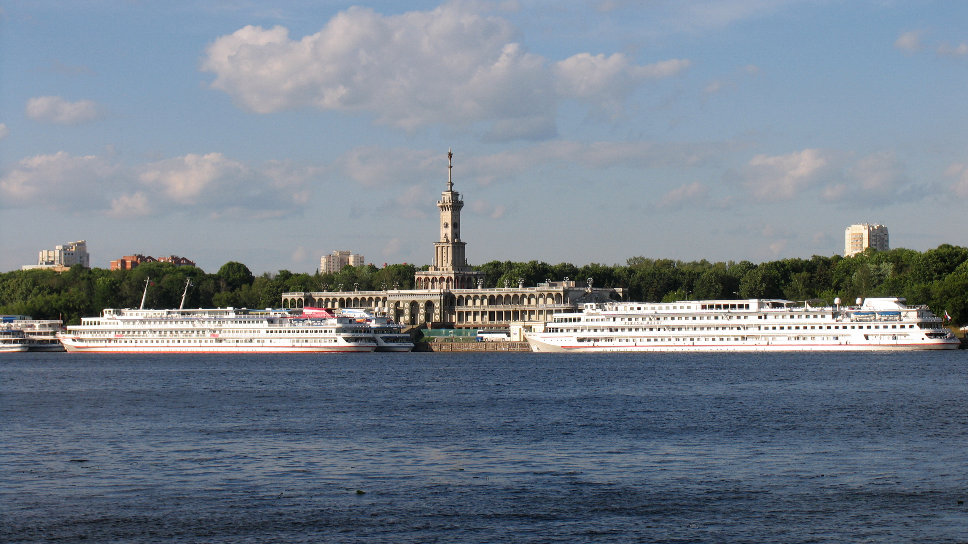 Речные круизные суда в Северном речном порту..